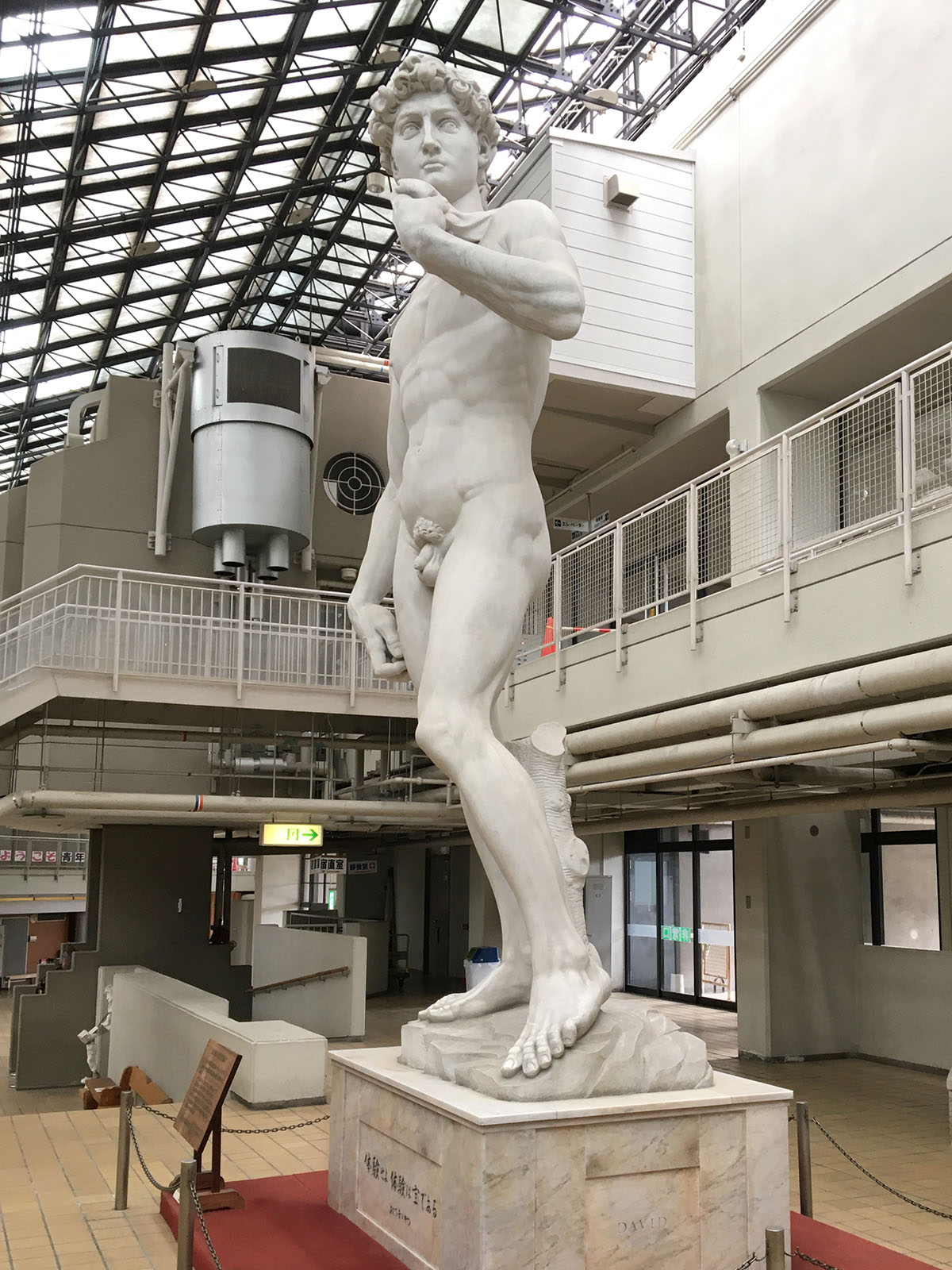 滋賀県希望が丘文化公園の青年の城に置かれたダビデ像